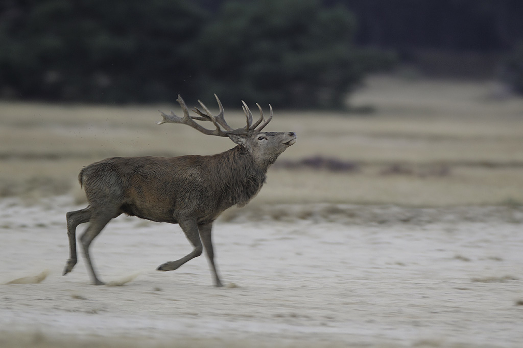 Edelhert rennend in de bronsttijd This is a photo or sound file made in Hoge Veluwe National Park in the Netherlands, with the main subject of the file in the category: animals